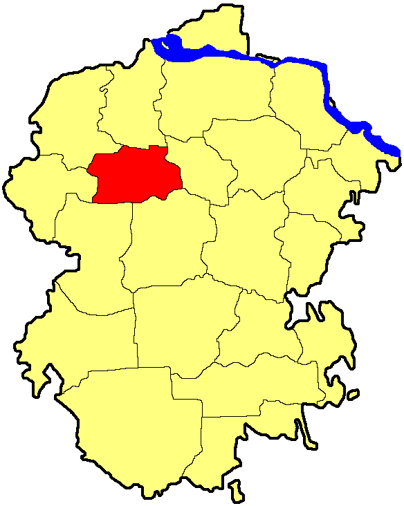 Аліковський район Чувашії